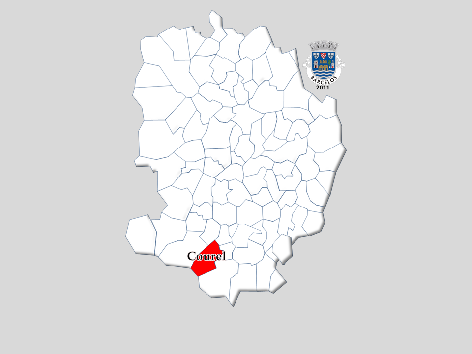 Censos 1864/2011